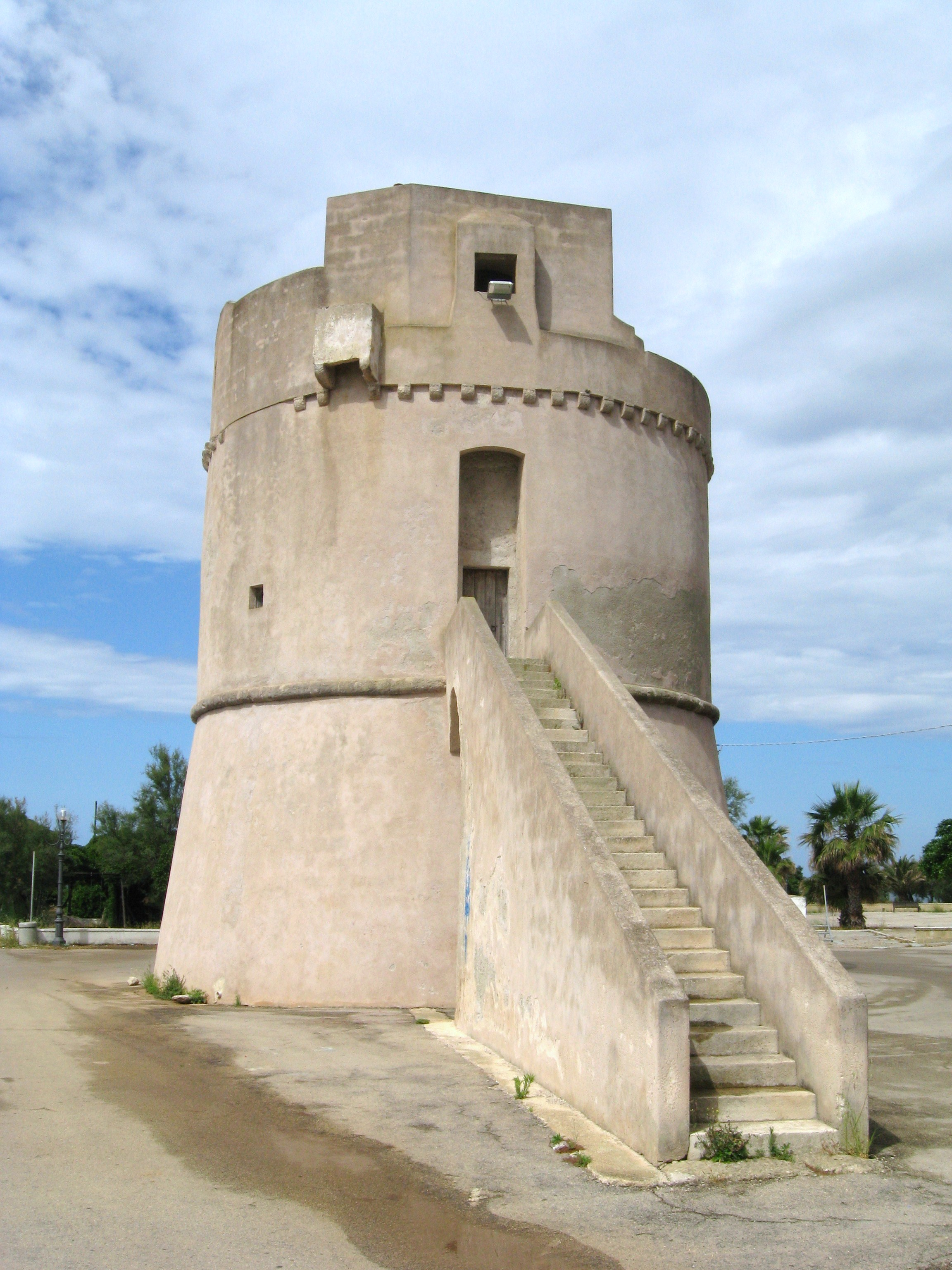 Torre suda, costruita per vigilare contro le incursioni saracene.